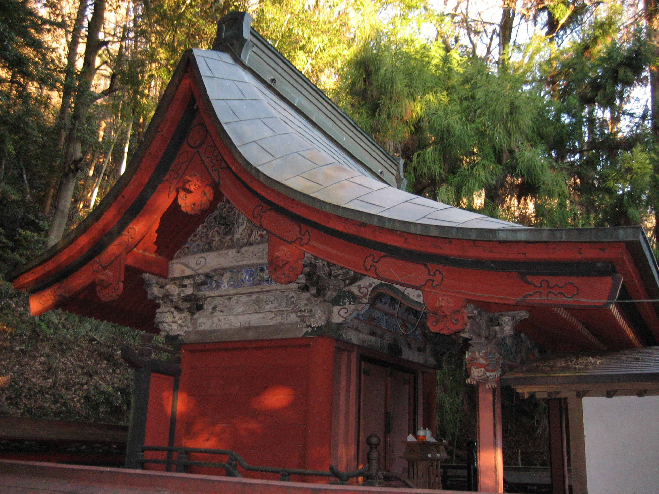 秩父市黒谷に鎮座する聖神社の本殿彫刻